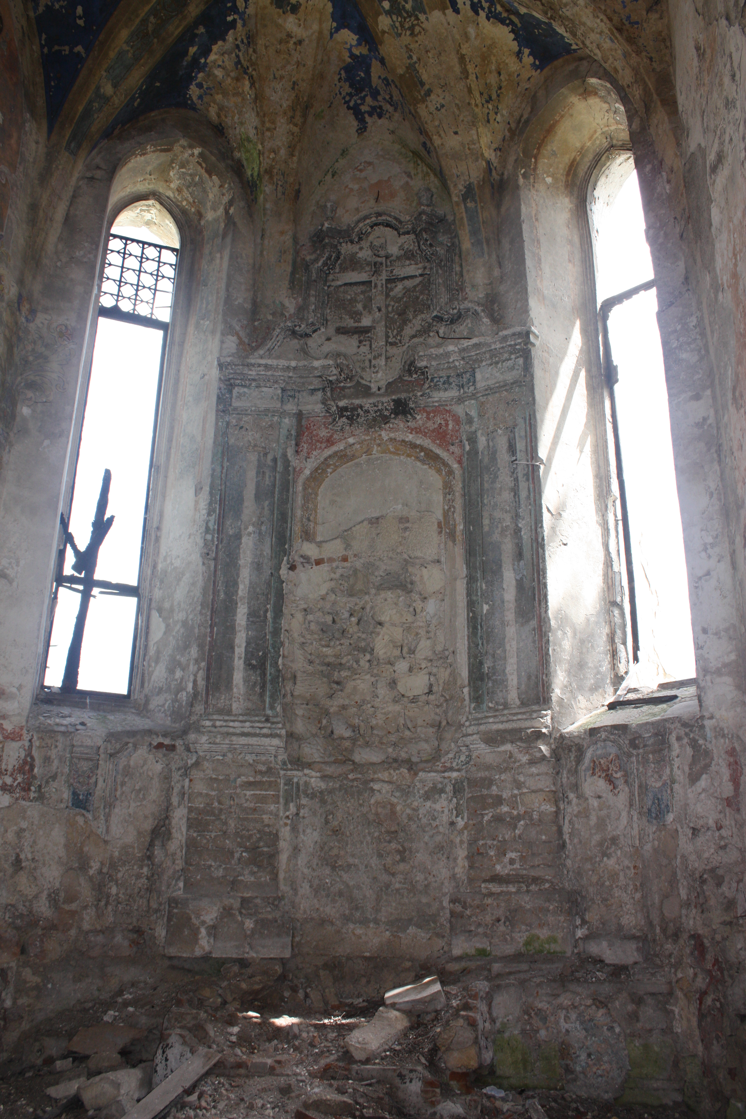 Retabulum stiukowe w prezbiterium za ołtarzem w kościele Trójcy Świętej Podhajce (Підгайці ) stan 2010